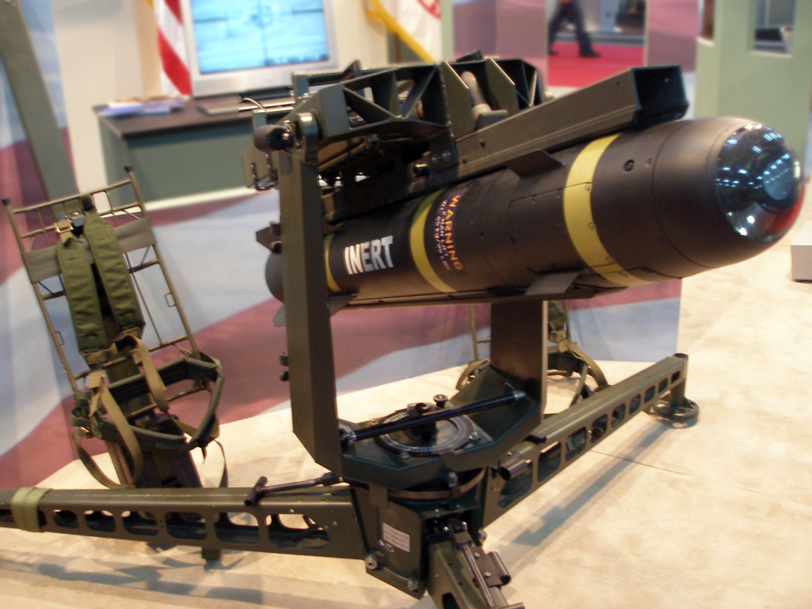 Hellfire M Rocket